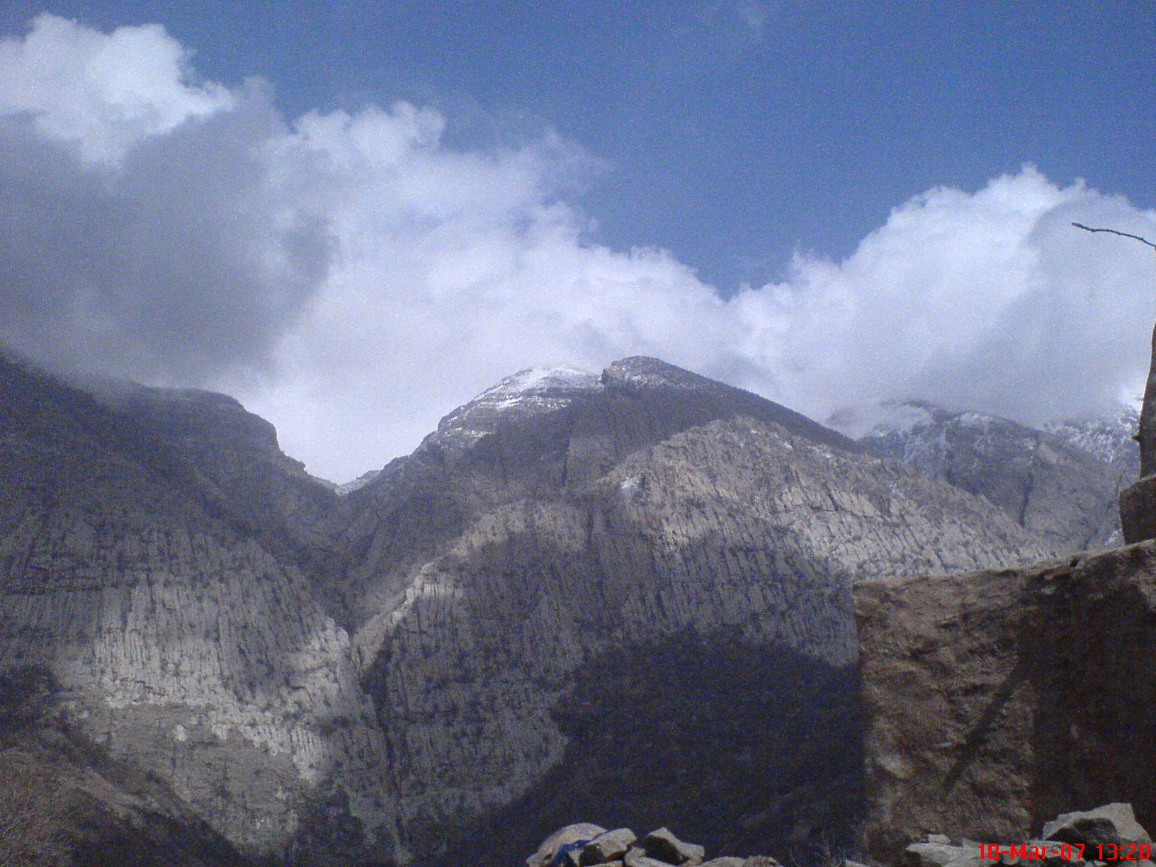 نماي سالن‌كوه از كنار آرامگاه پيرچل در آستانه فرارسيدن بهار عكاس: حسين روشندل